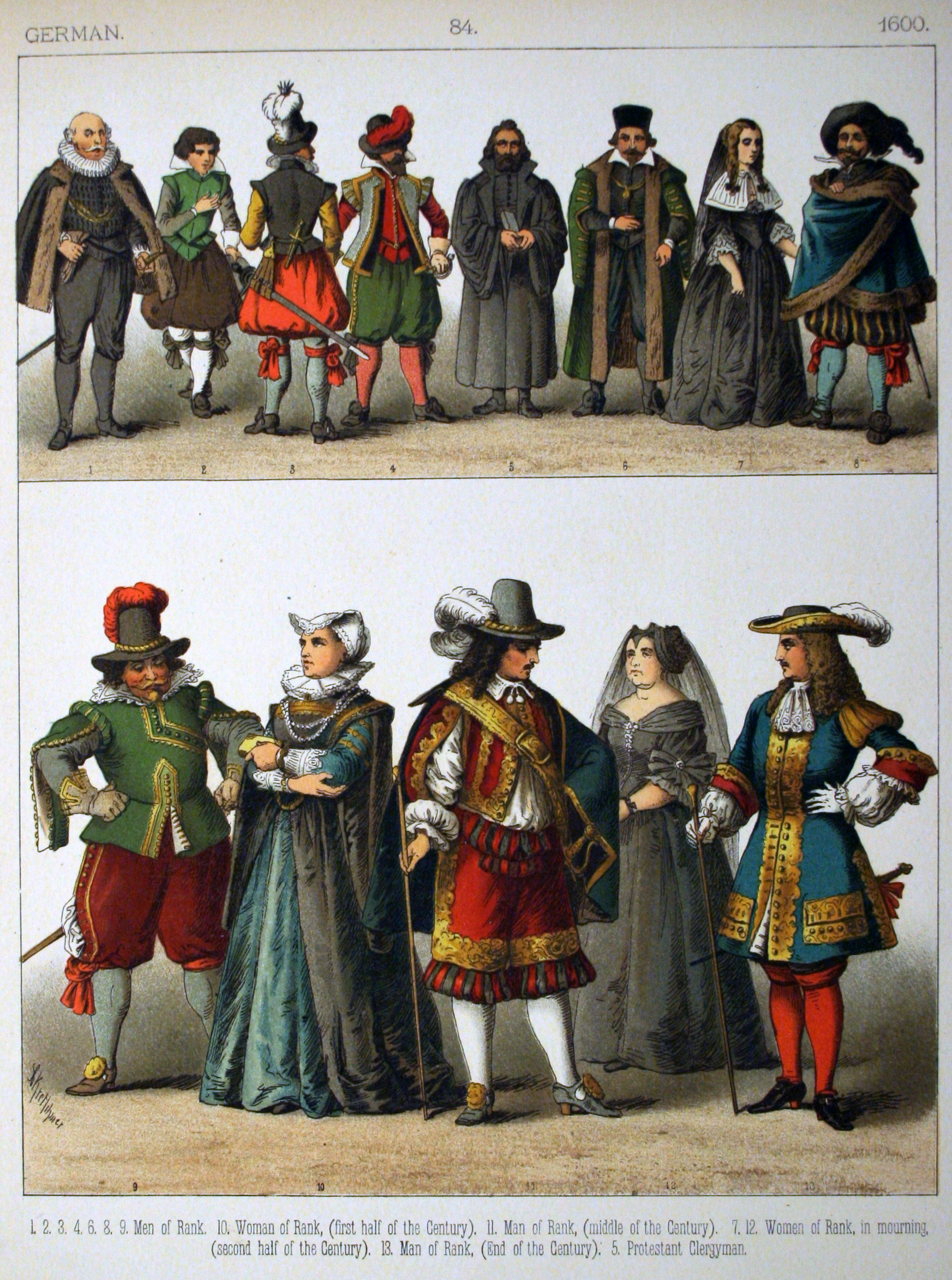 1600, German